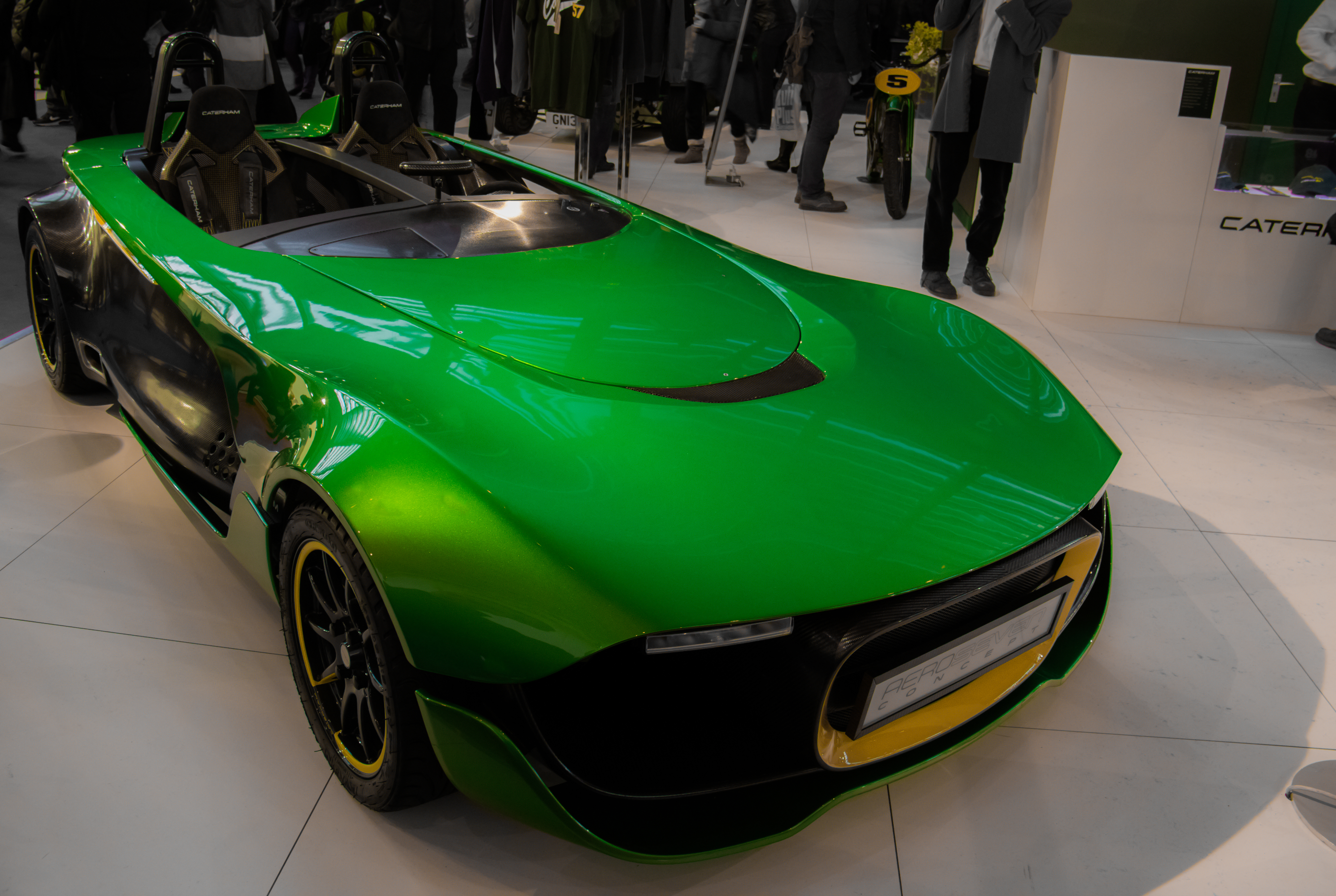 aero seven concept